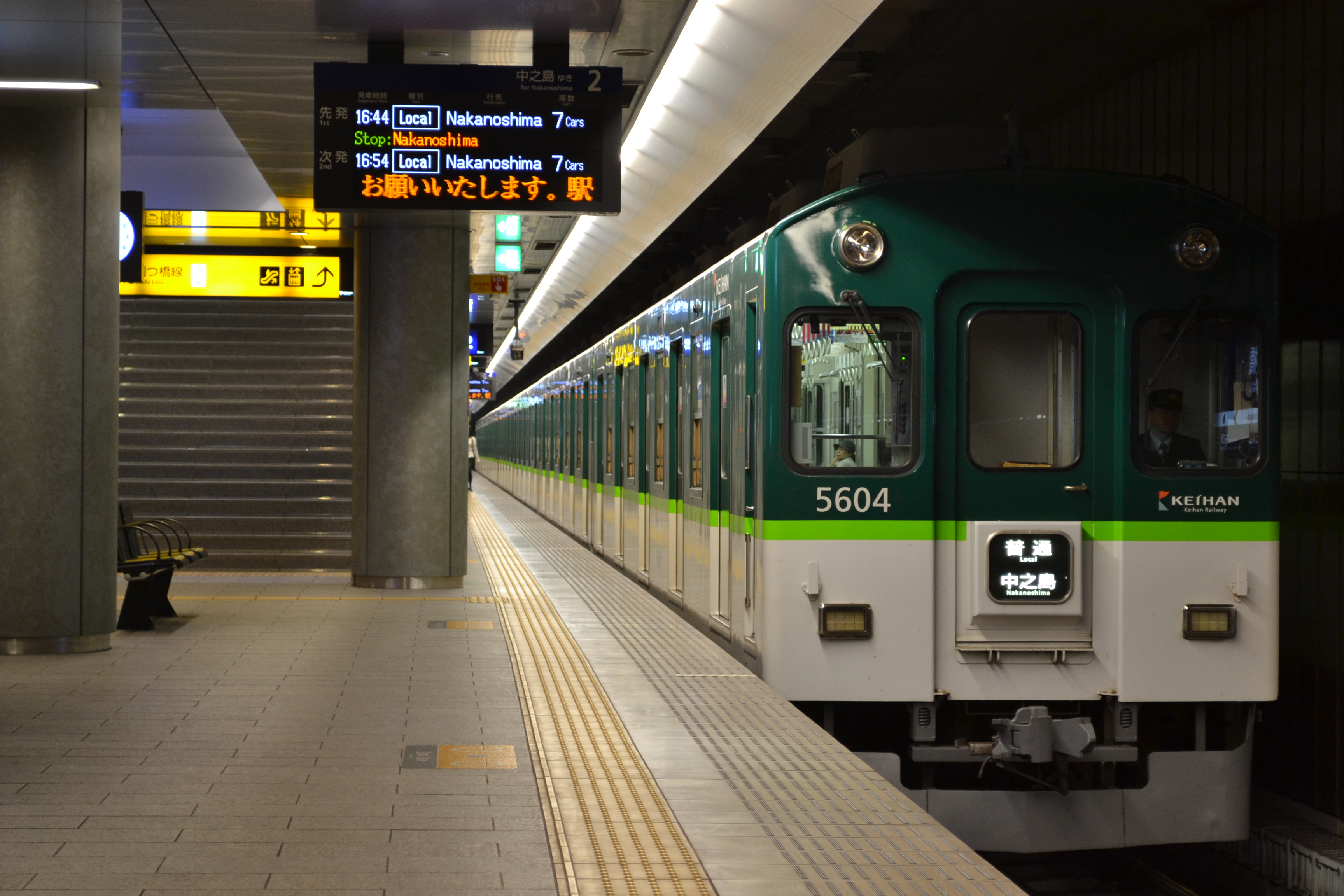 渡辺橋駅停車中の5000系